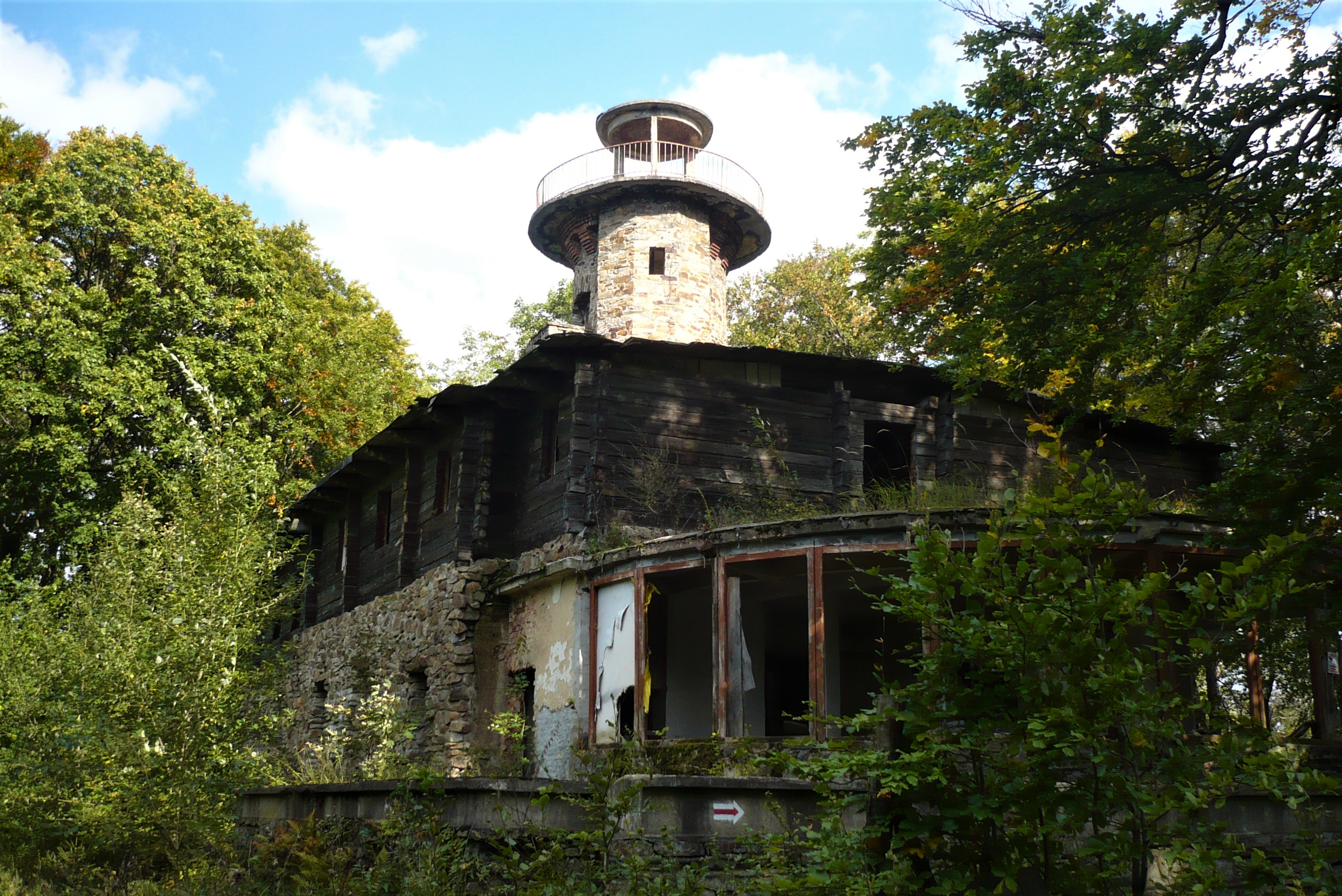 Schronisko na Parkowej Górze